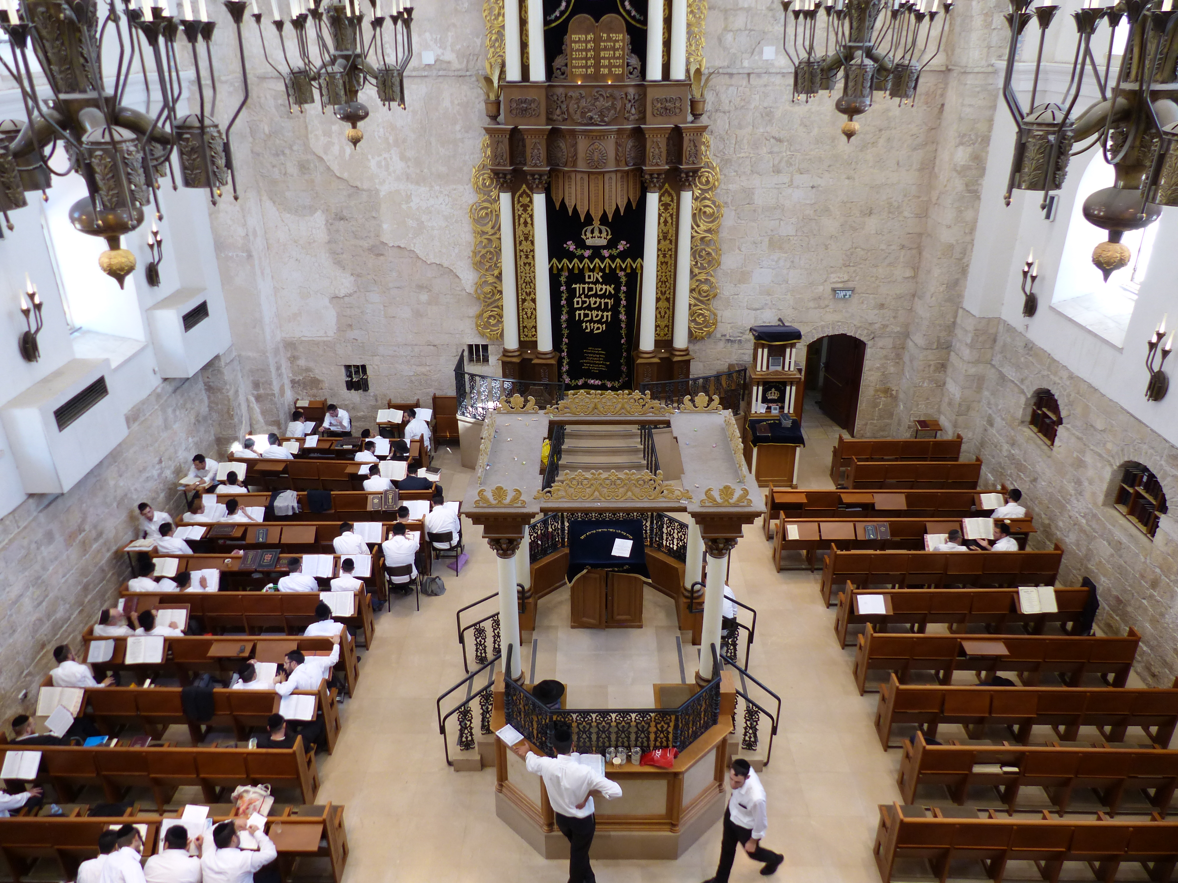 Interior de la sinagoga Hurva, Jerusalén